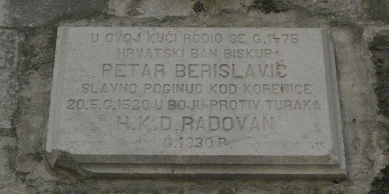 Trogir: detail